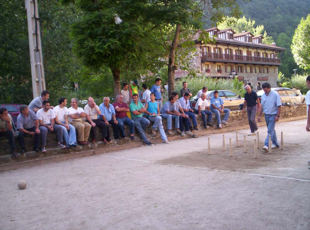 Juego de bolos en Cosgaya.